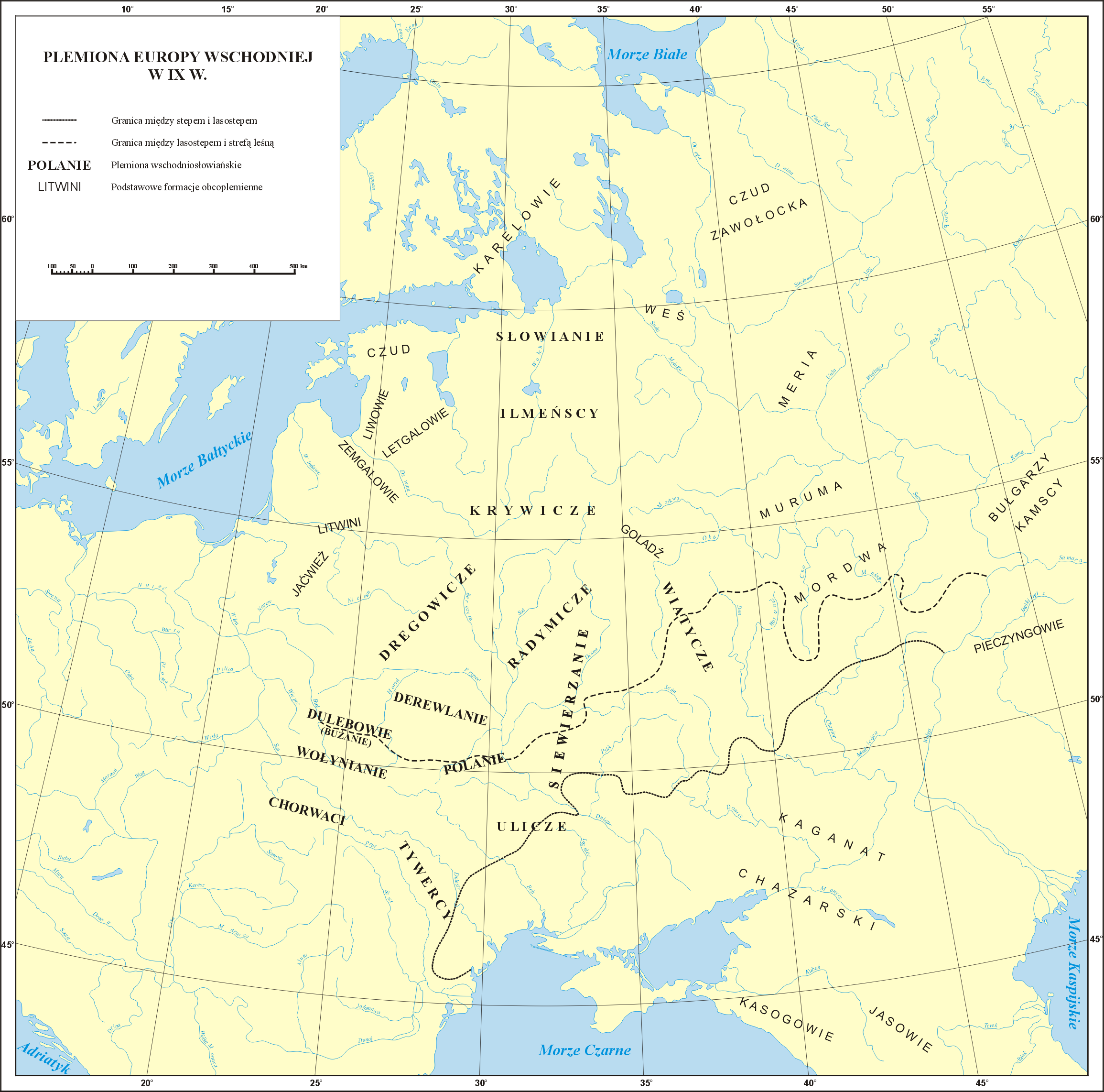 Mapa plemion wschodniosłowiańskich